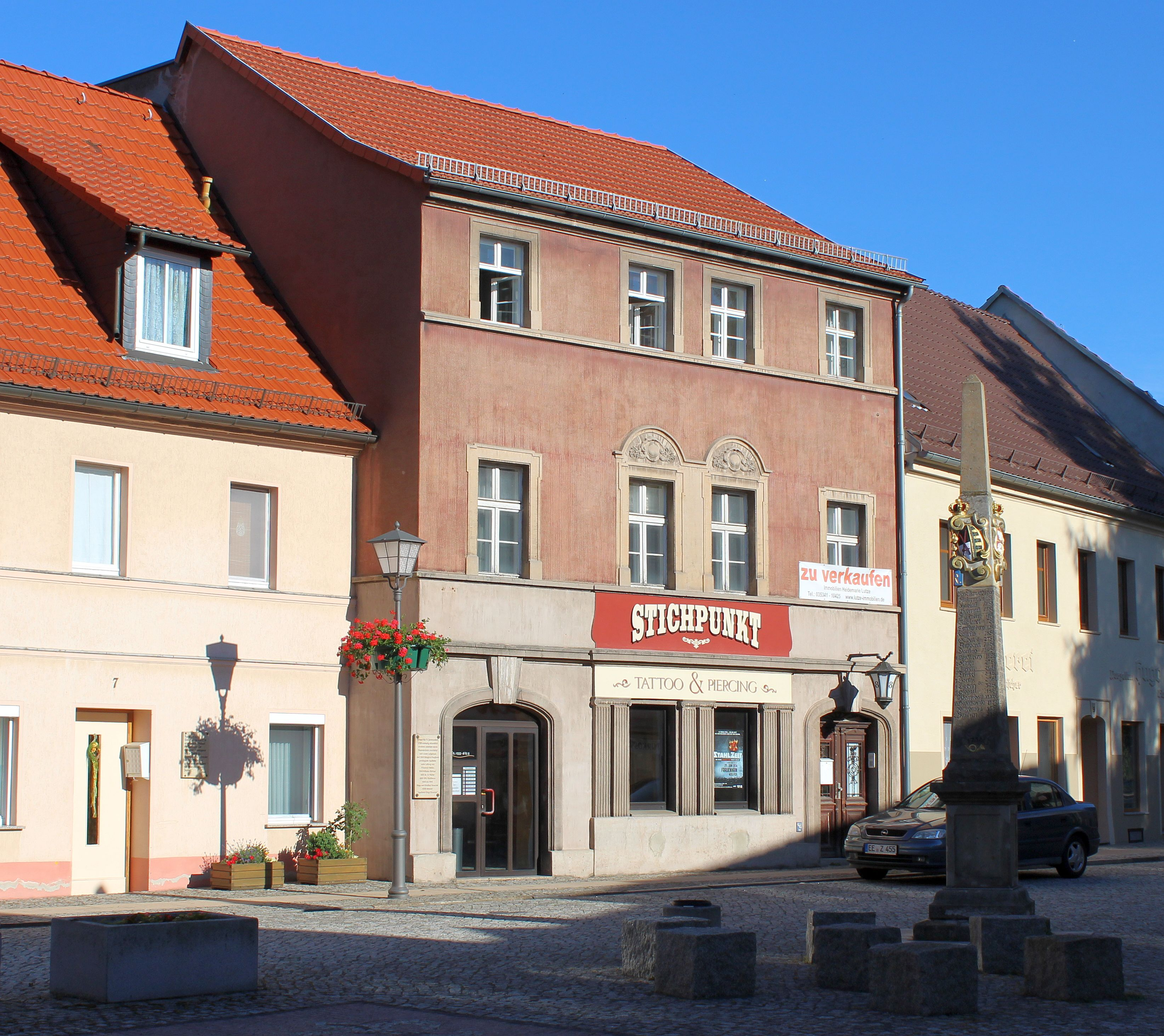 Die ehemalige Apotheke in Elsterwerda.